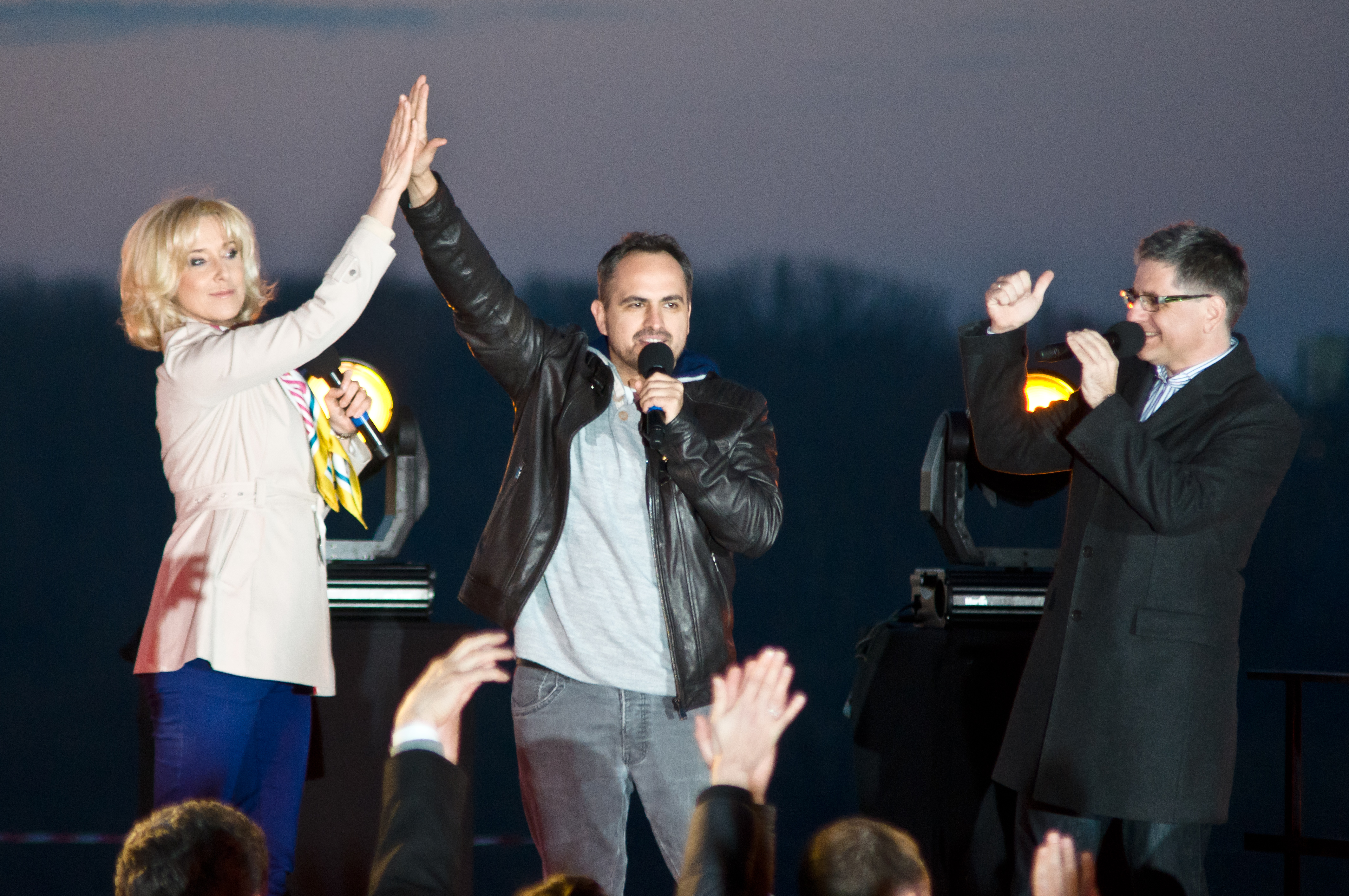 Agata Młynarska i Agustin Egurrola pieczętują symboliczne połączenie dwóch brzegów Wisły. Otwarcie Mostu Marii Skłodowskiej-Curie w Warszawie, 24 marca 2012.